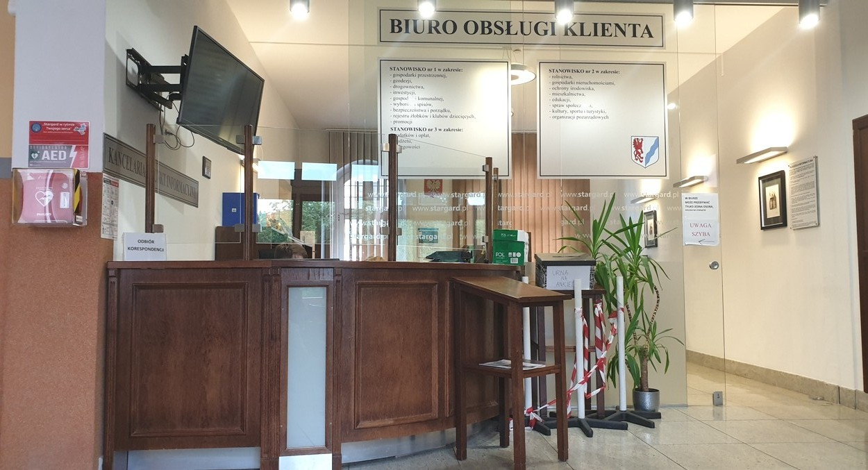 Stargard. Biuro Obsługi Klienta